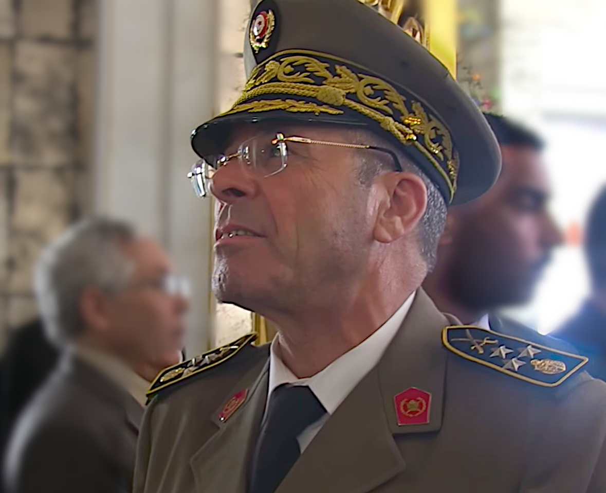 تزامنا مع ذكرى وفاة الزعيم الحبيب بورقيبة ,دشن اليوم السبت 6 أفريل 2013 رئيس الجمهورية المؤقت المنصف المرزوقي متحف الزعيم الحبيب بورقيبة بقصر صقانس الرئاسي بمدينة المنستير . متابعة و تصوير و مونتاج : أمين مطيراوي Facebook : nawaat : Twitter : @nawaat.com .